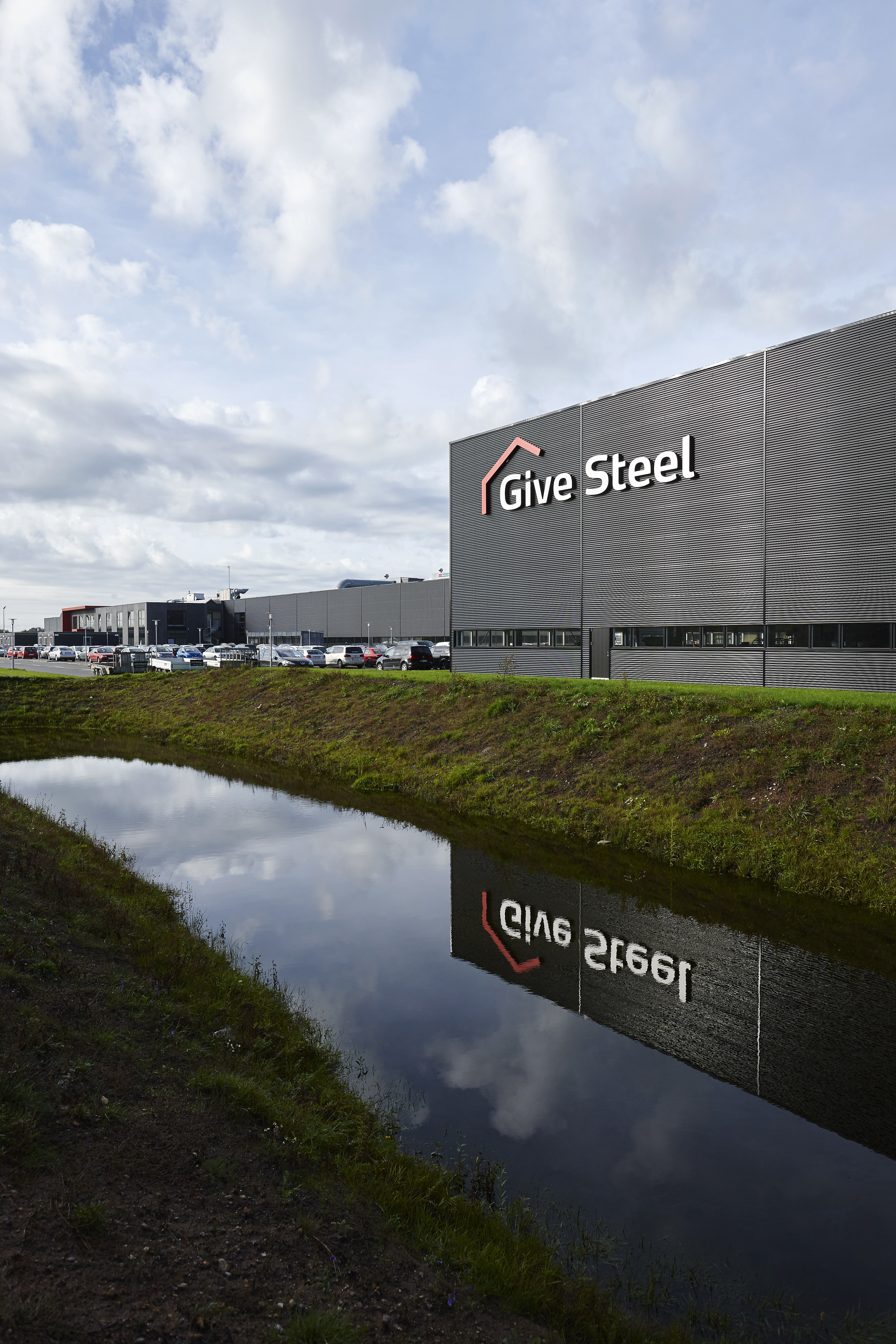 Give Steel hovedsæde i Brande